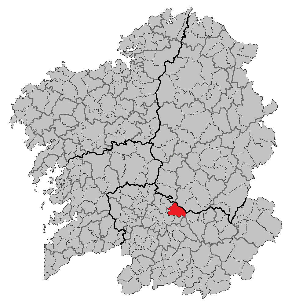 Mapa coa localización do concello de Nogueira de Ramuín.